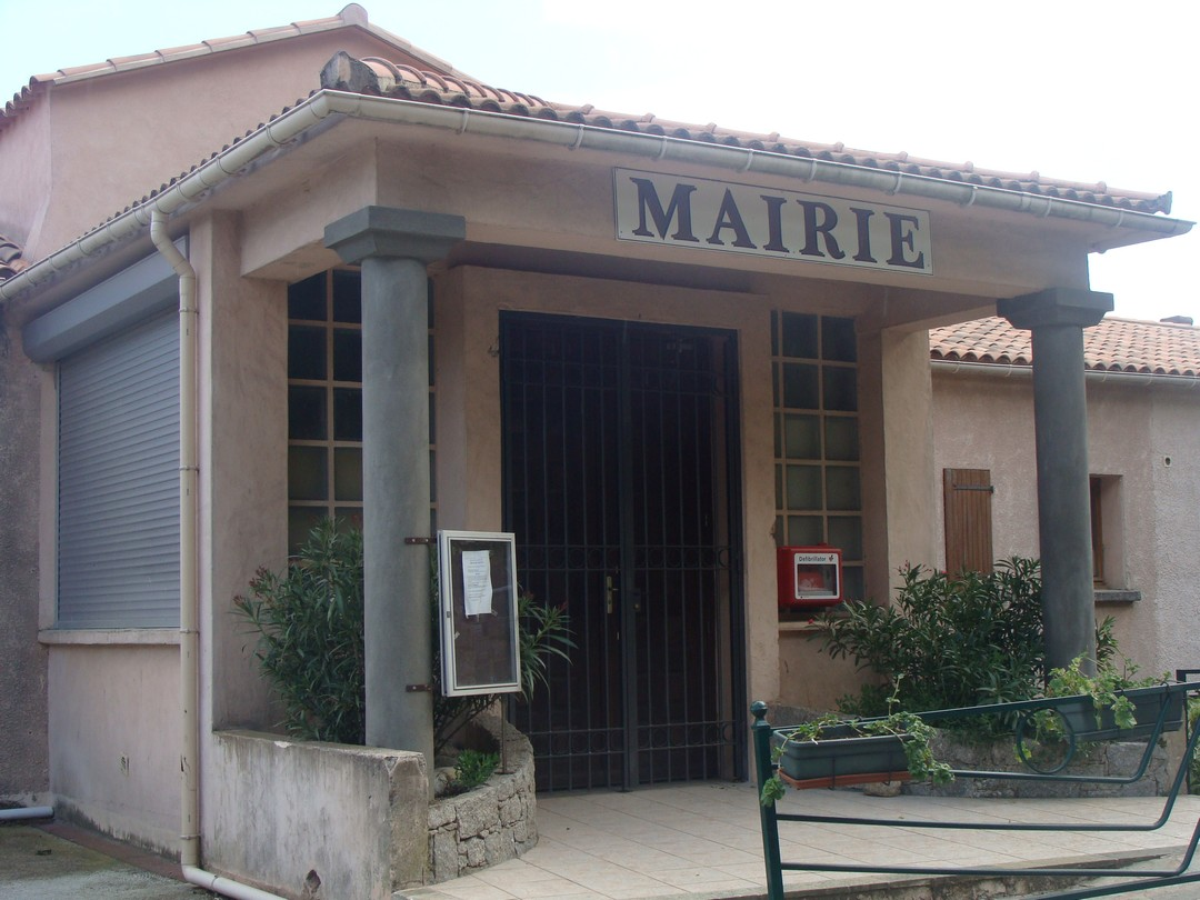 La mairie d'Isolaccio-di-Fiumorbo